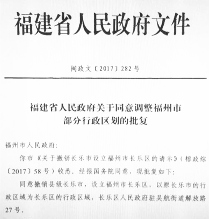 福州市长乐区撤市设区文件